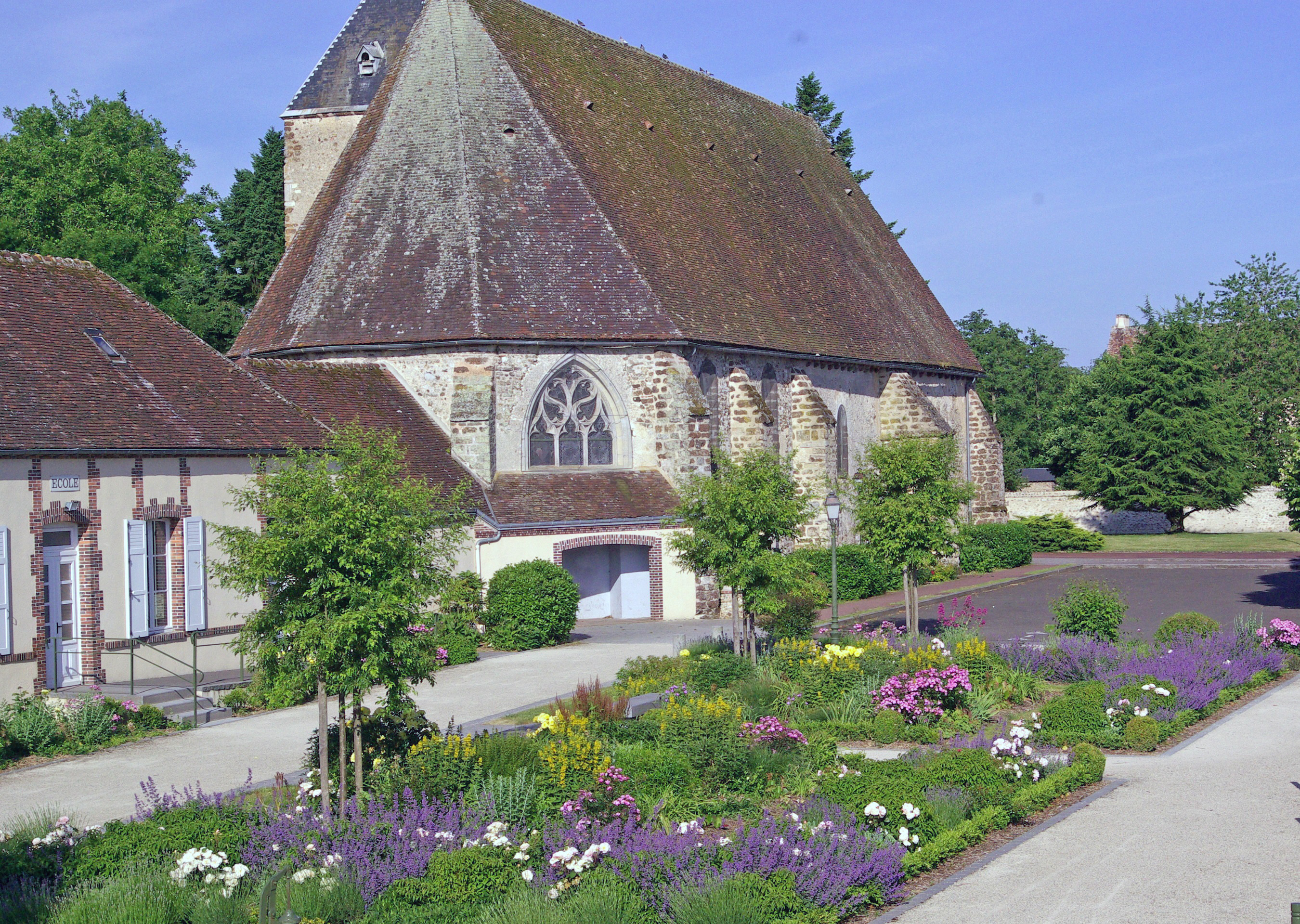 La place de l'Eglise au printemps